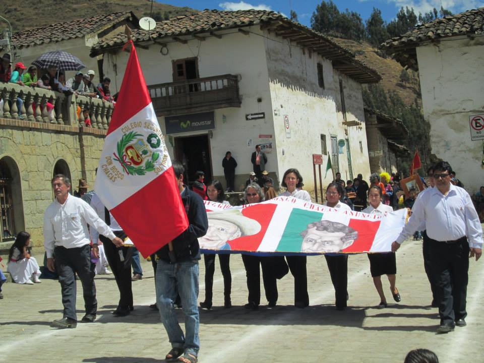 Docentes del taller Don Bosco, sede Chacas